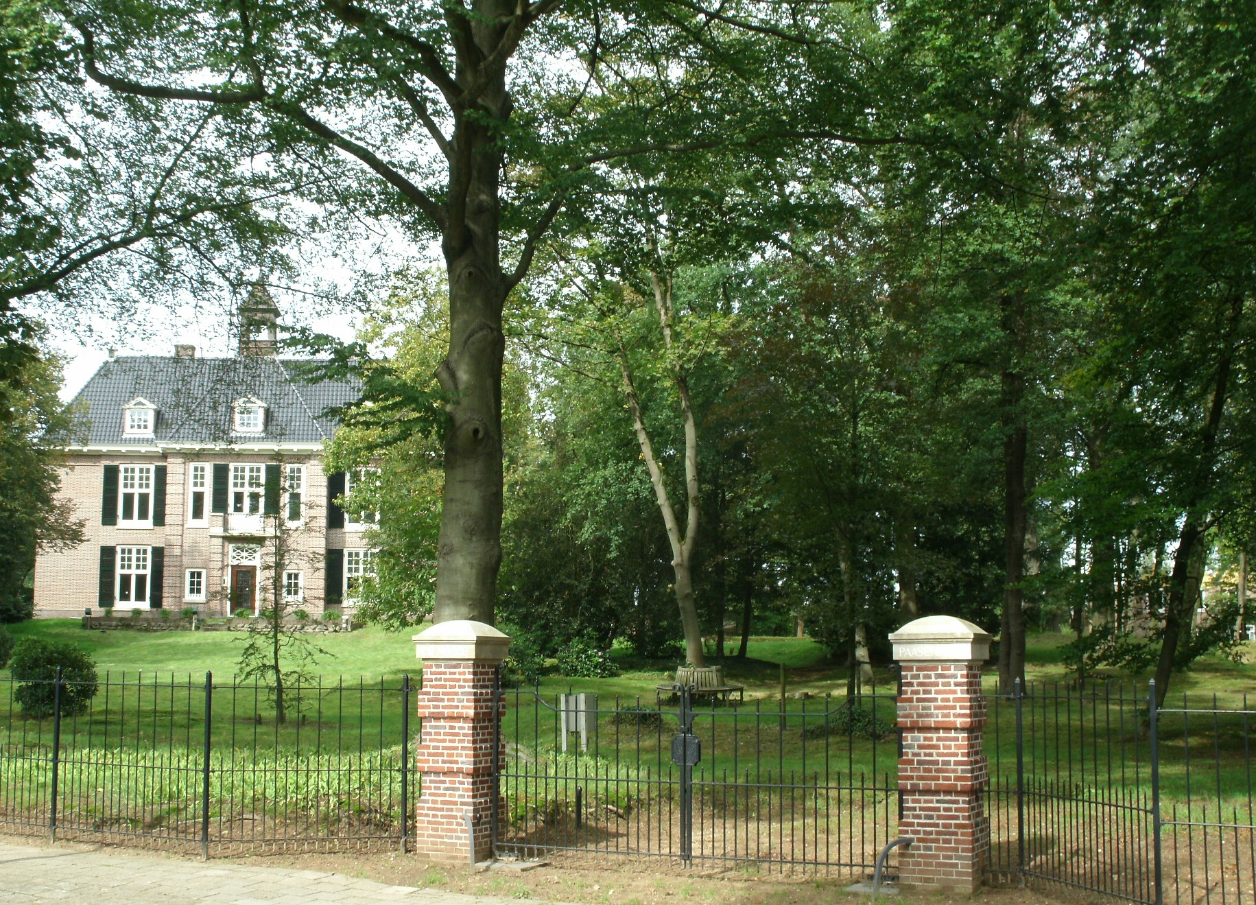 Huis Hooge Paaschberg Ede. Gemeentelijk monument